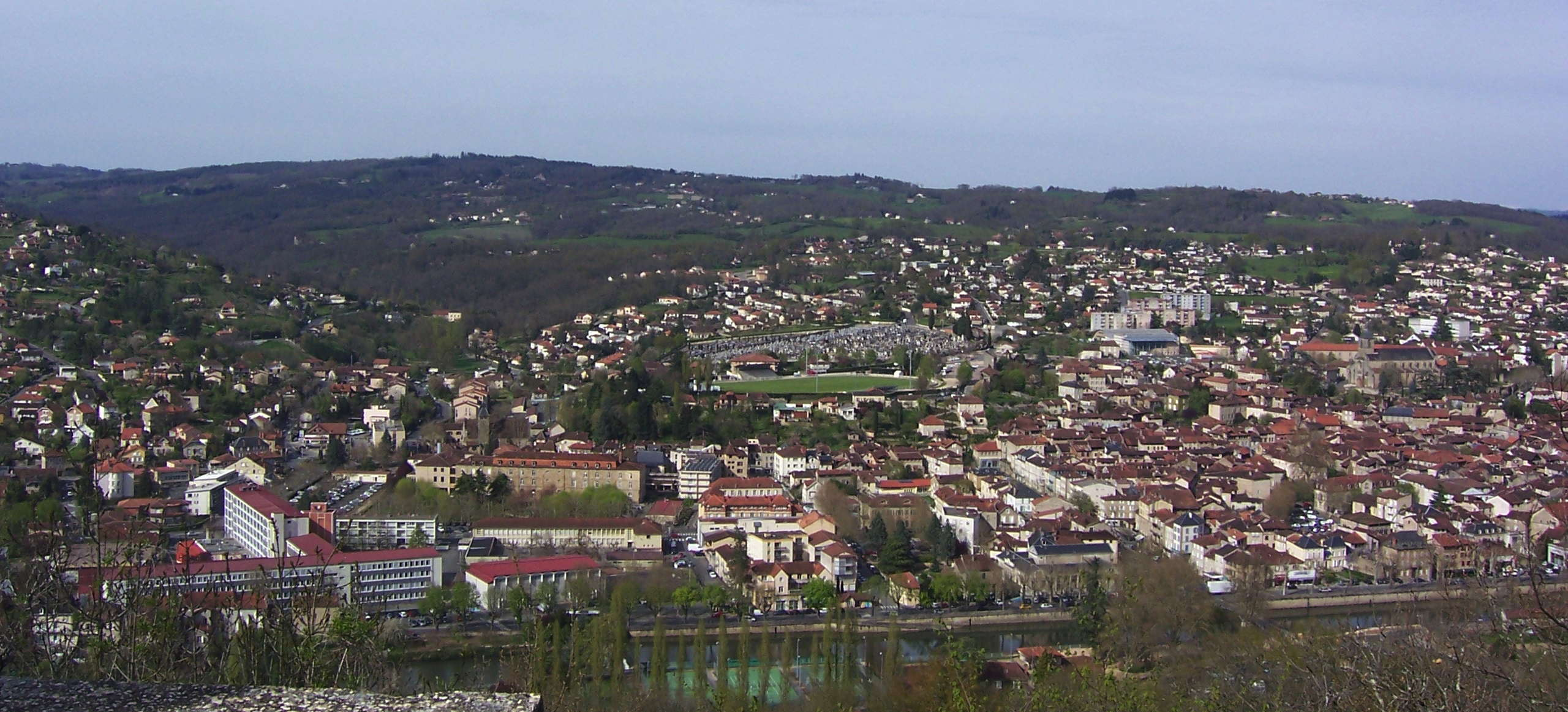 Vue de Figeac depuis le monument du Cingle.